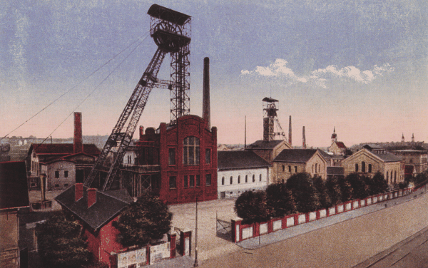 Důl Jindřich v Moravské Ostravě, kolorovaná pohlednice z roku 1914